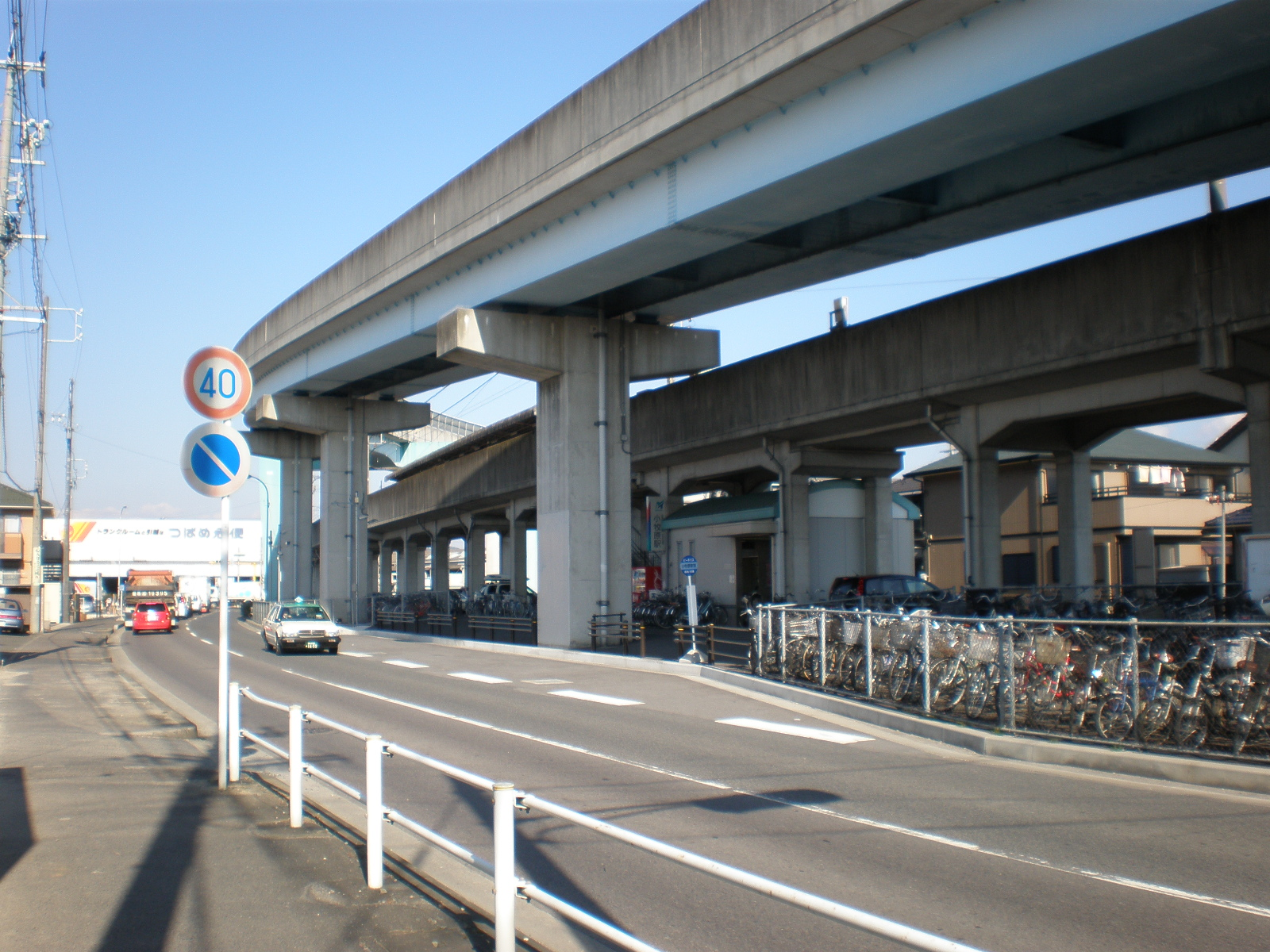 愛知県小牧市にある名鉄小牧原駅